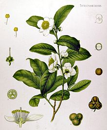 Čaj